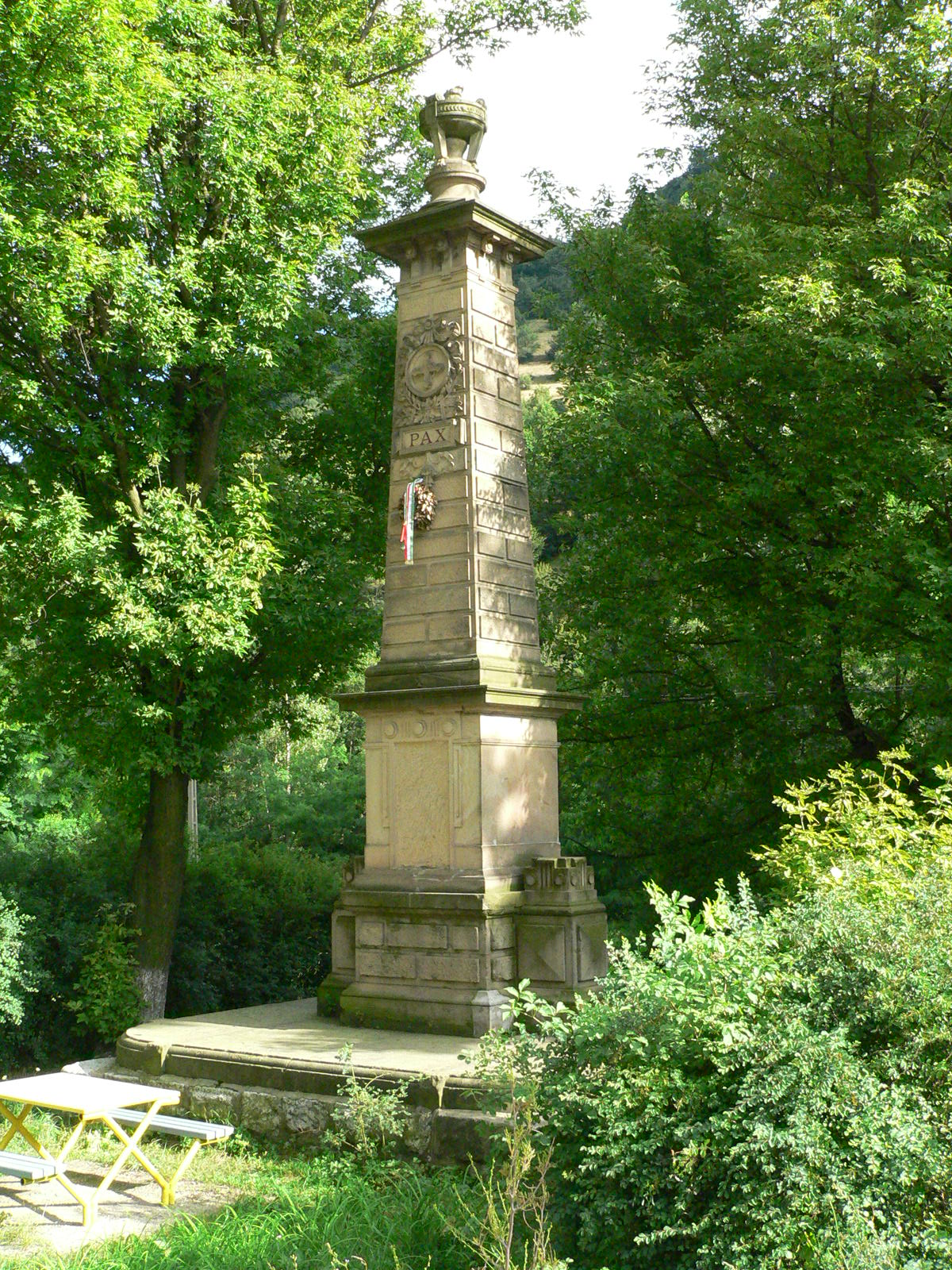 Zalatna, az 1848-as mészárlás emlékműve (Románia)